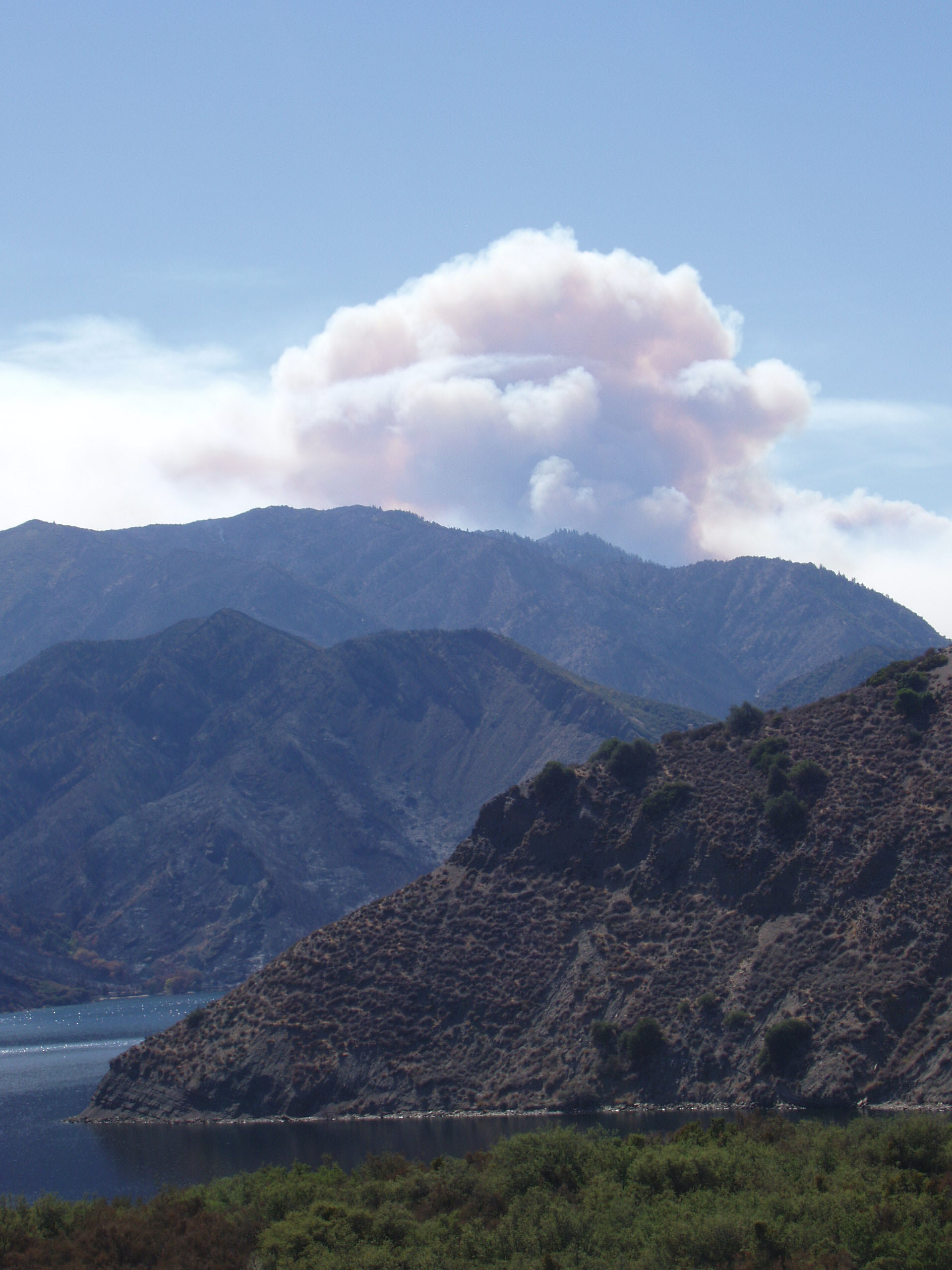 Pyrocumulus by Piotr Flatau